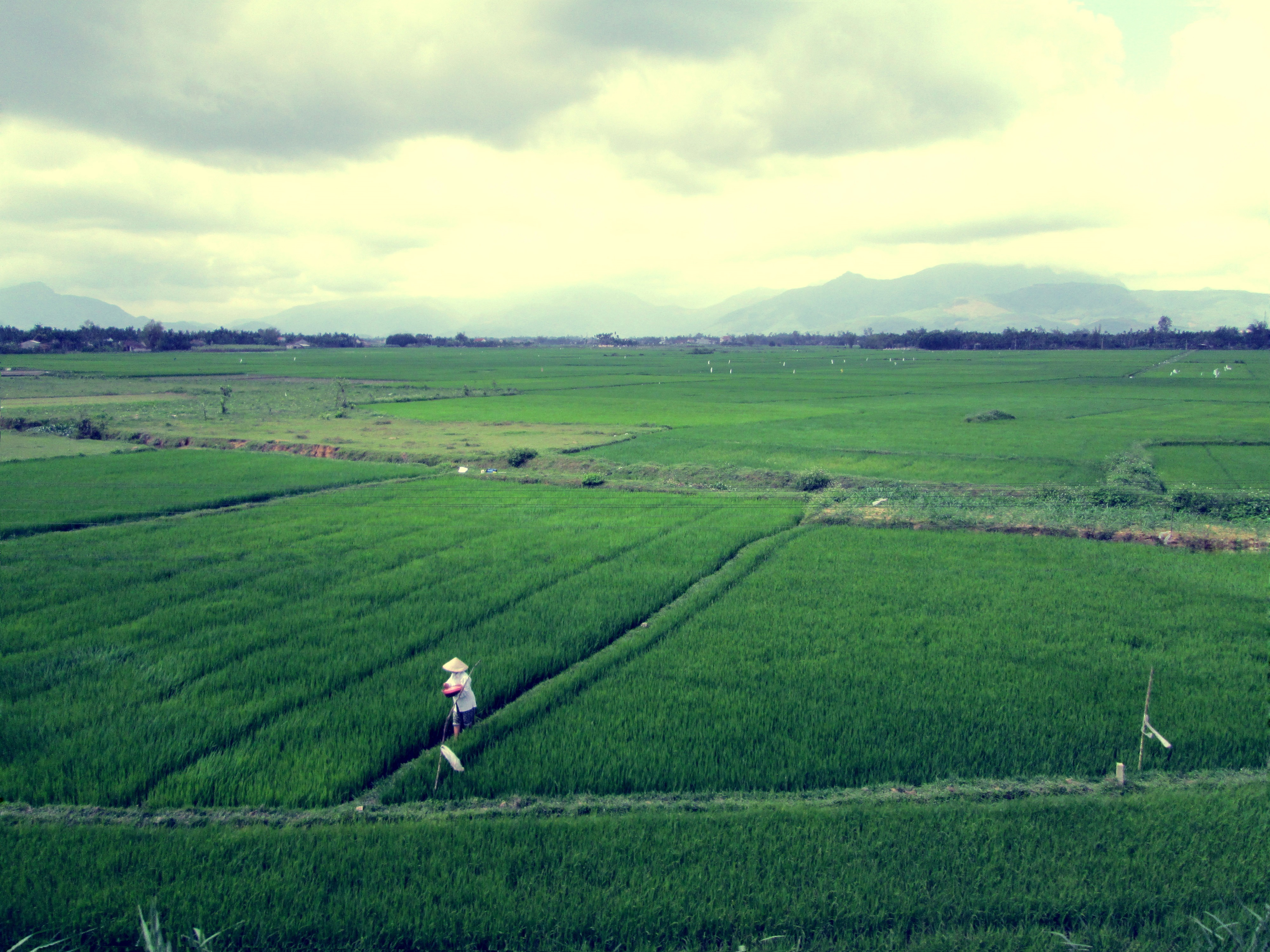 Phong cảnh tại Quảng Ngãi, Việt Nam